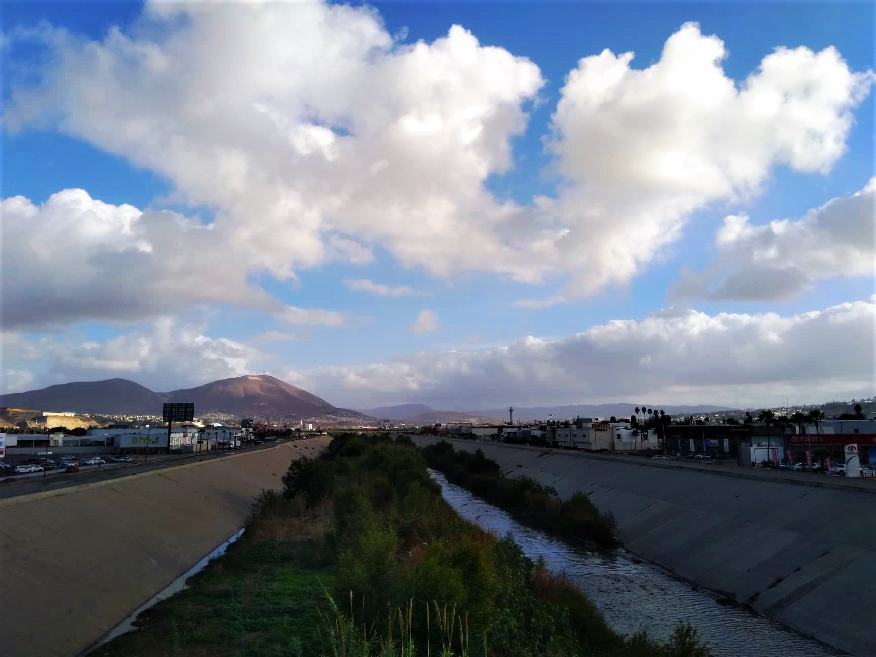 Canalización del Río Tijuana en la delegación La Mesa